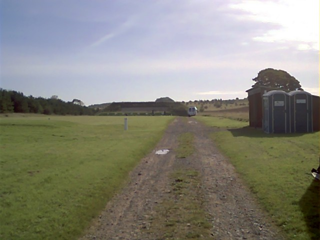 Yoxter Range, Somerset